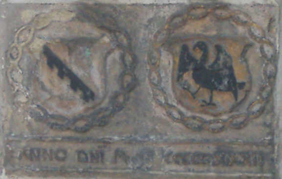 Falkenhof, Wappen am Torhaus